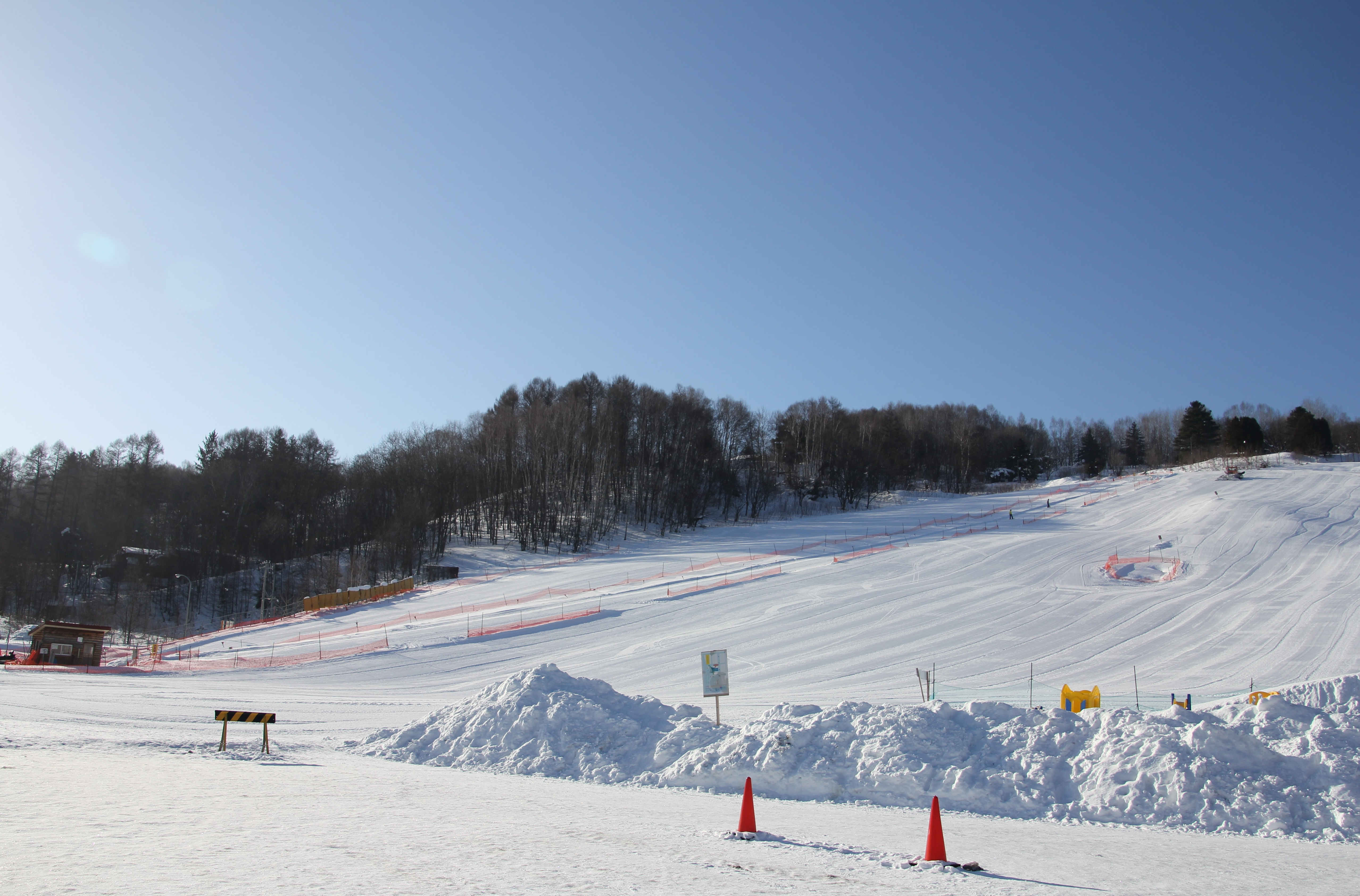 旭川市郊外の市営スキー場にて供用中のロープトゥリフト